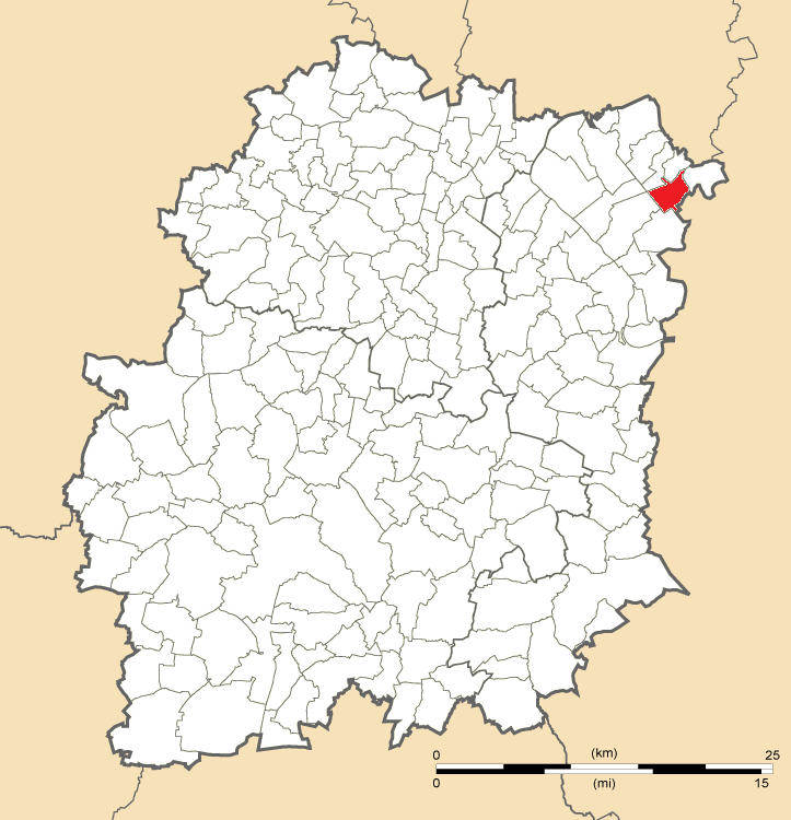 Carte de position de Quincy-sous-Sénart en Essonne (91)